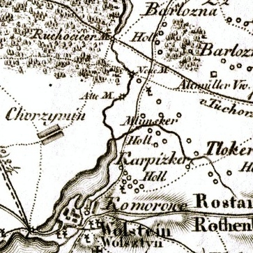 Karpitzko, Wollstein. Fragment arkusza AIII.